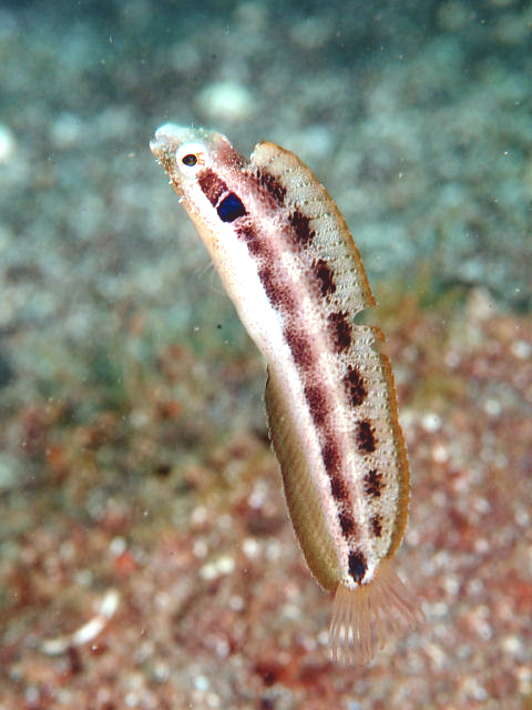 フタホシニジギンポ Petroscirtes springeri